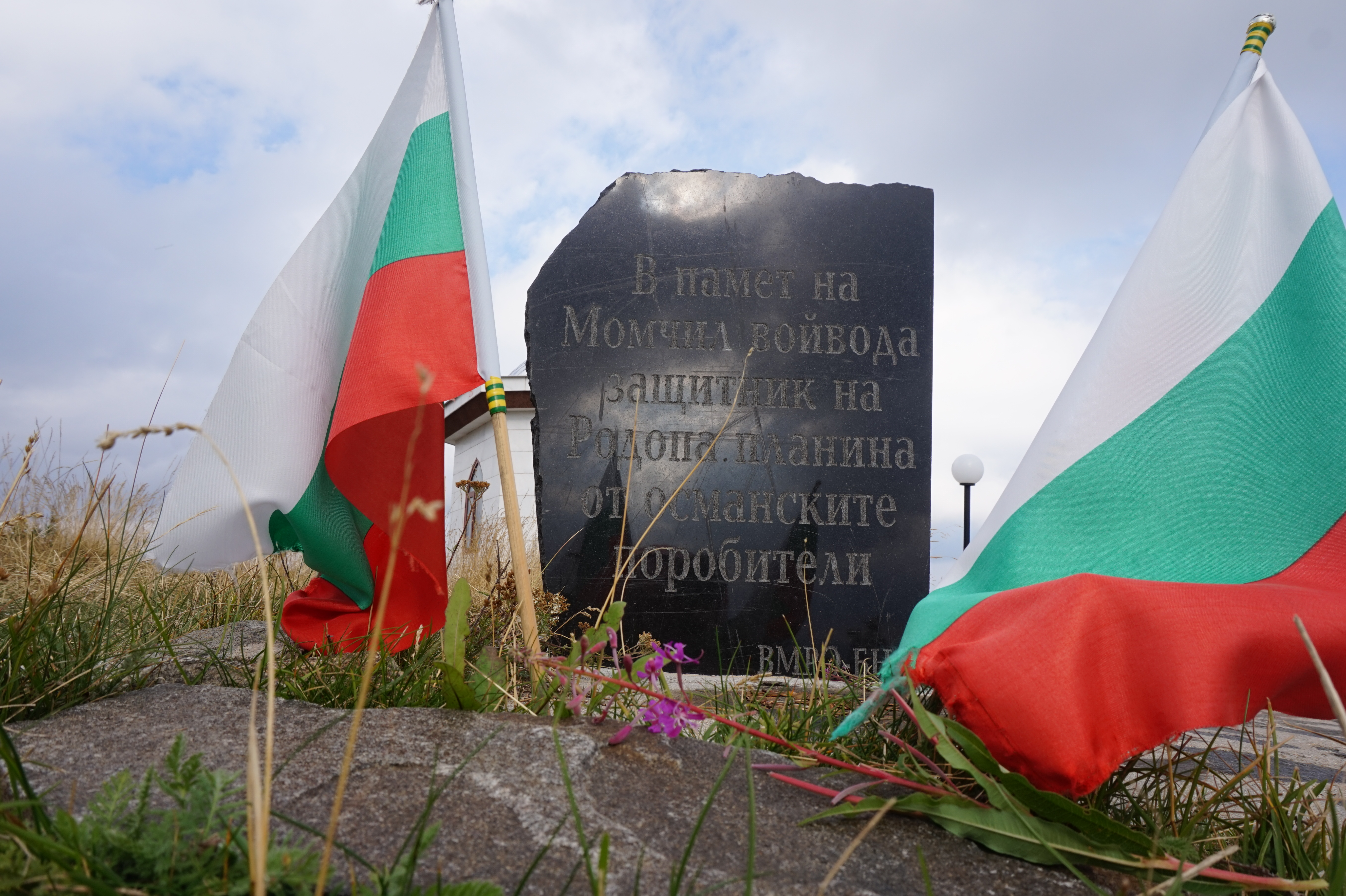 Паметник на Момчил войвода - защитника на българите от турското нашествие на българския връх Свобода, 1915м н.в.